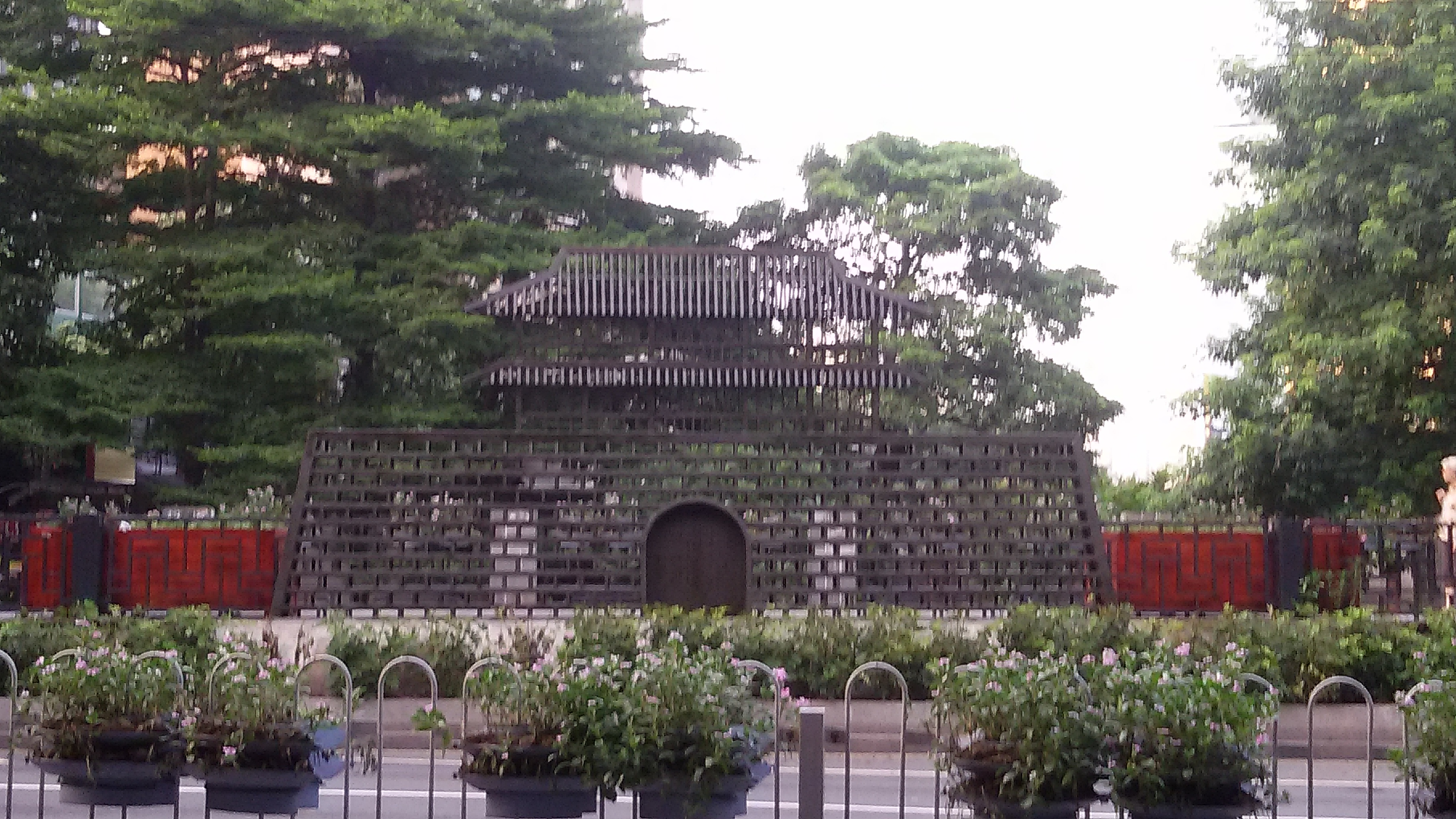 粵語: 西門口甕城遺址